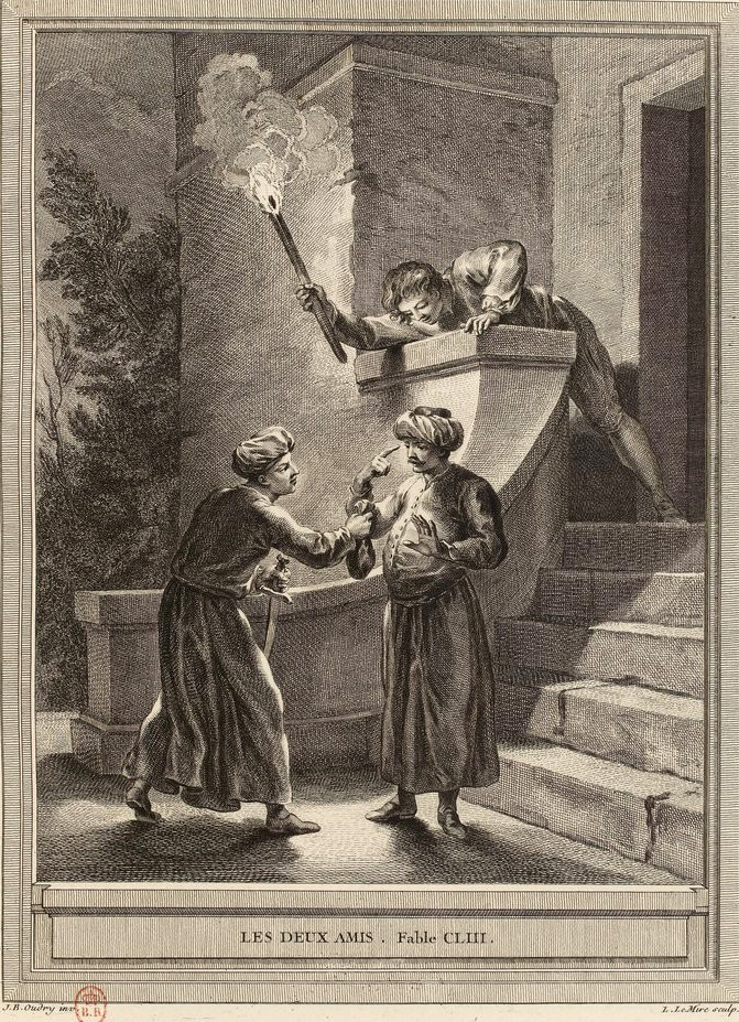 Gravure réalisée par Noël Le Mire d'après un dessin de Jean-Baptiste Oudry représentant la fable Les deux amis de Jean de La Fontaine (fable 11 du livre VIII). Cette gravure est parue dans l'édition complète des fables de La Fontaine, parue en quatre tomes chez l'éditeur Desaint & Saillant, rue saint Jean de Beauvais à Paris, 1755-1759.